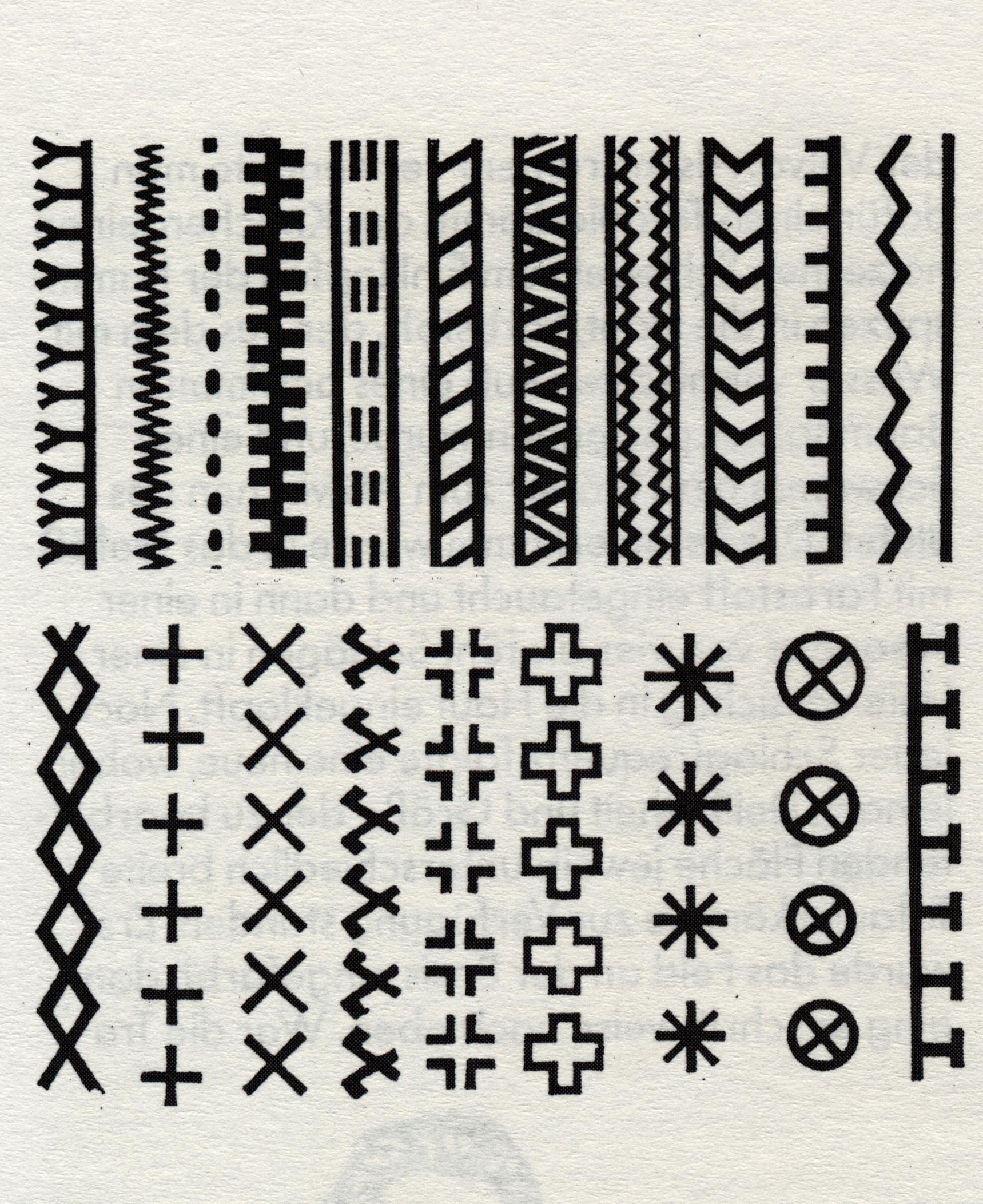 Palauanische Tatauierungsmuster